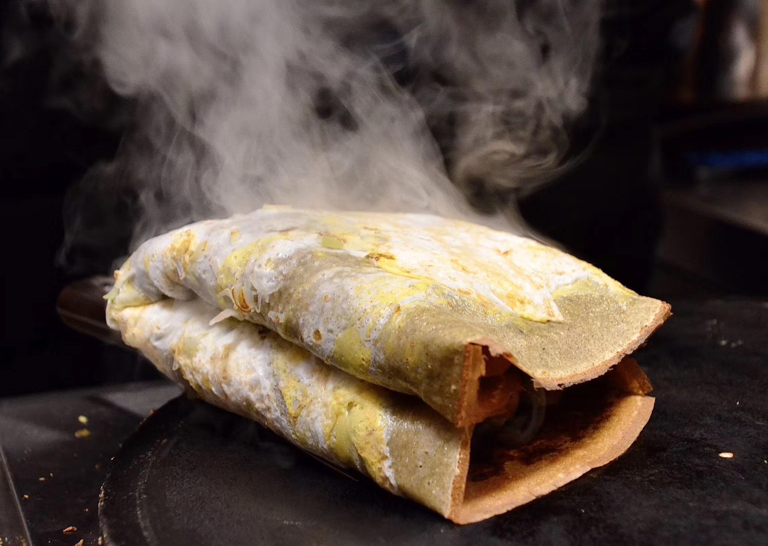 中文（中国大陆）: 煎饼馃子制作过程